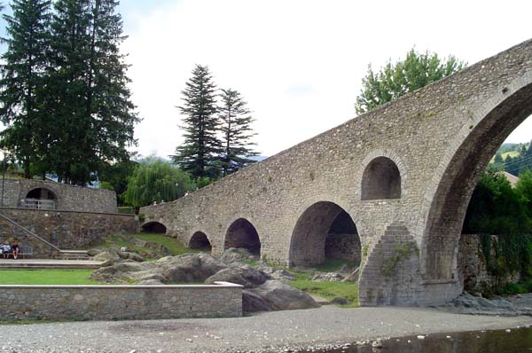 El Puente nuevo